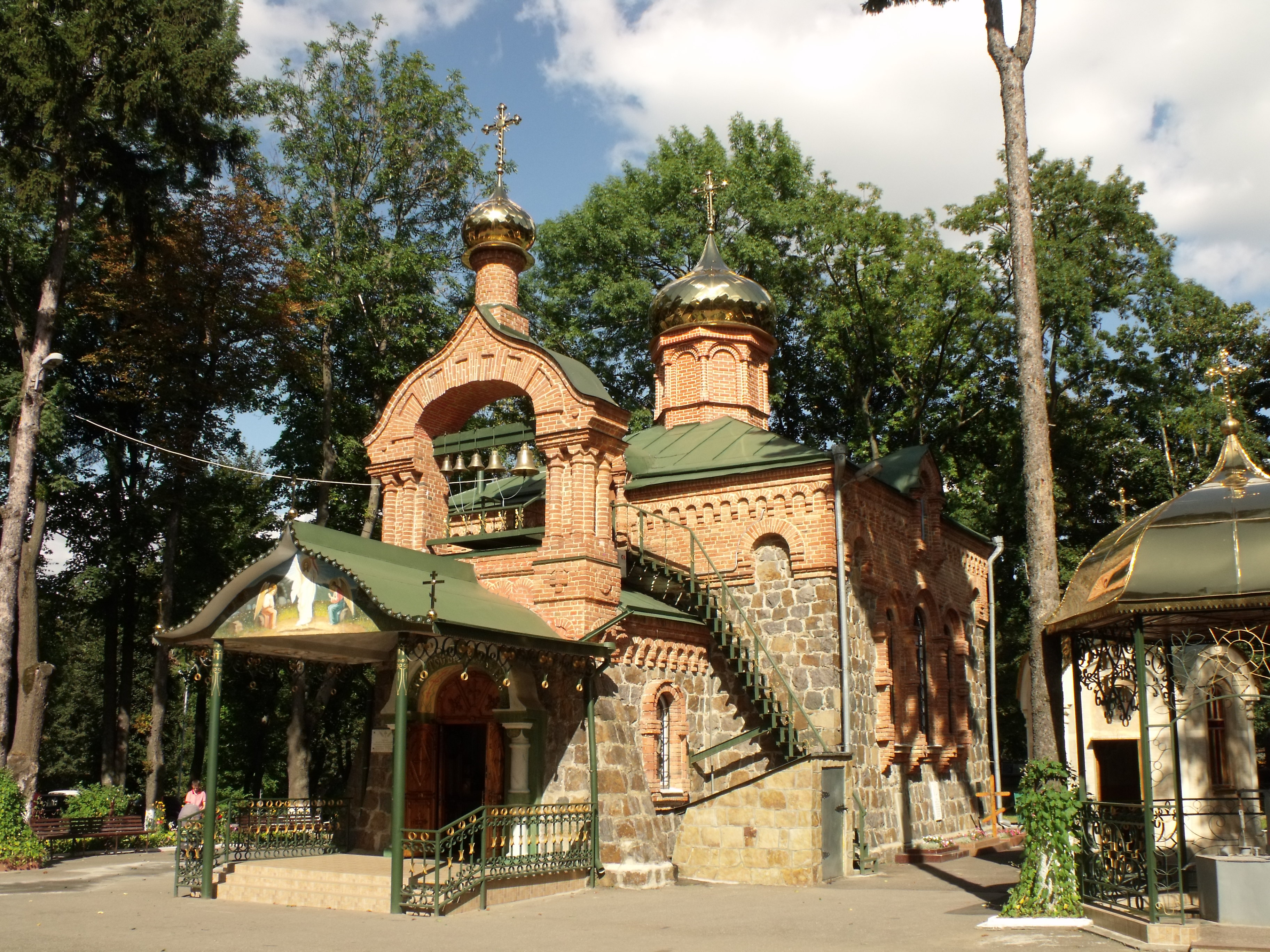 Вінниця, Хмельницьке шосе, 5